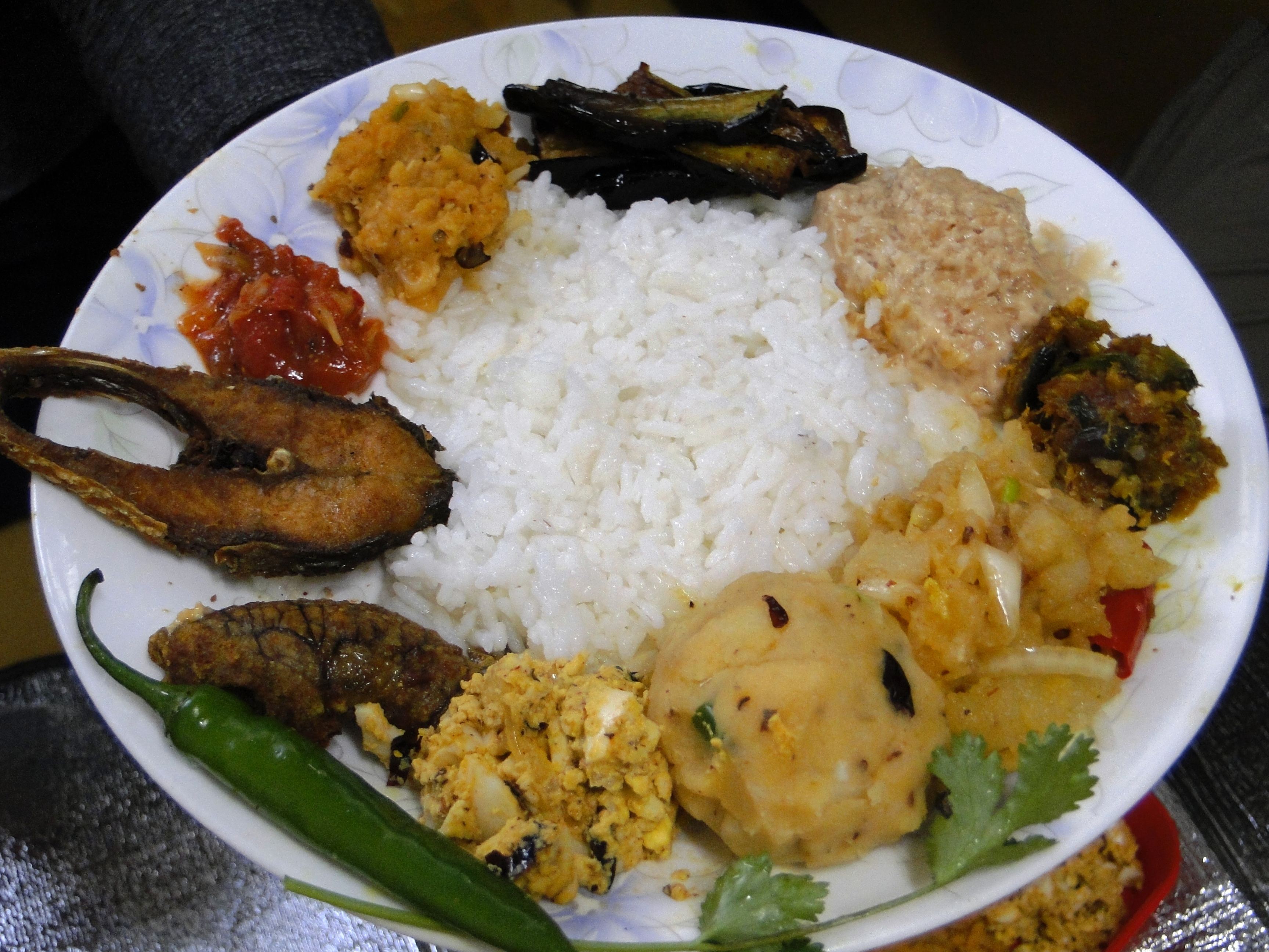 পহেলা বৈশাখ বাংলা নববর্ষ উপলক্ষ্যে পান্তা ভাতের সাথে ইলিশ মাছ, বিভিন্ন ধরনের ভর্তা এবং কাচা মরিচ পরিবেশন